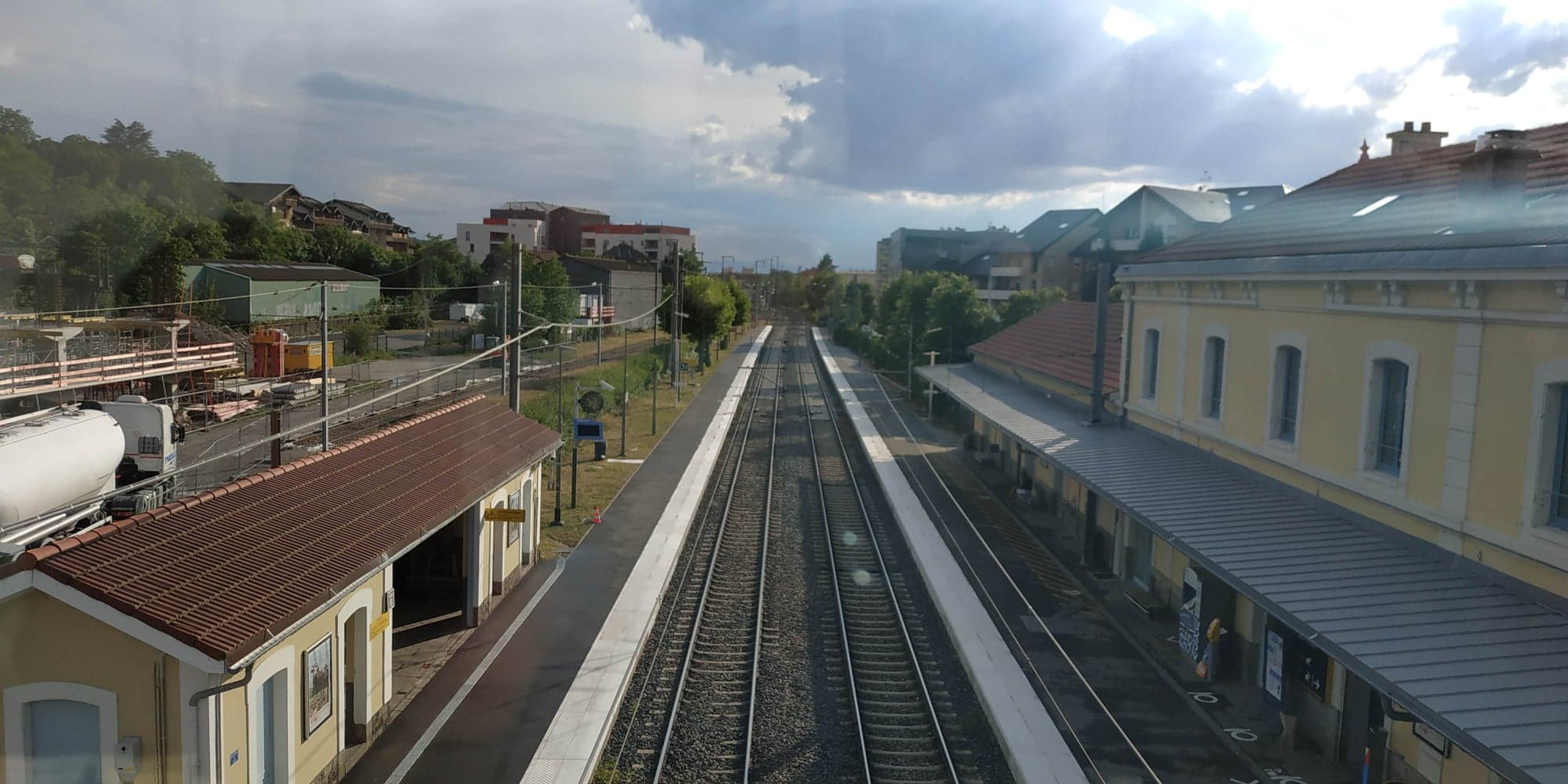 Quais et voies rénovés